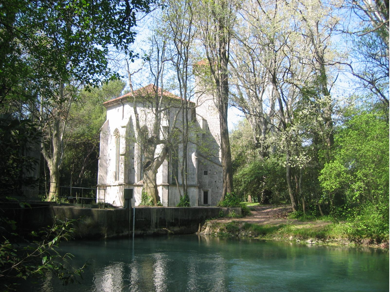 Karst spring of 2km long river Timavo (slov.: Timava) near Golfo di Panzano at San Giovanni di Duino. In Slovenia river Reka submerges in a gigantic Ponor of Škocjan Caves and emerges after ca. 38km as "Foce del Timavo". After 2km it flows into a kanal of Monfalcone harbour (region of Friuli-Venezia Giulia). Mächtige Karstquelle Foce del Timavo und nur 2km langer Fluss bis zu Hafenkanal von Monfalcone, Region Friaul-JulischVenetien. Austritt des Flusses Reka, der im Karst Slowenien's ein gewaltiges Höhlensystem schuf (UNESCO Weltkultur- und Naturerbe Škocjan-Höhlen). Nach ca. 50km Einzugsgebiet über undurchlässigem Flysch legt er unterirrdisch die 38km im Kalkgestein des Kras bis zur Timavo-Quelle zurück. Foce del Timavo poco dopo le risorgive. Il fiume e sfocia in Golfo di Panzano nei pressi di San Giovanni_di_Duino (Friuli-Venezia Giulia). photo:Ziga 10 April 2007